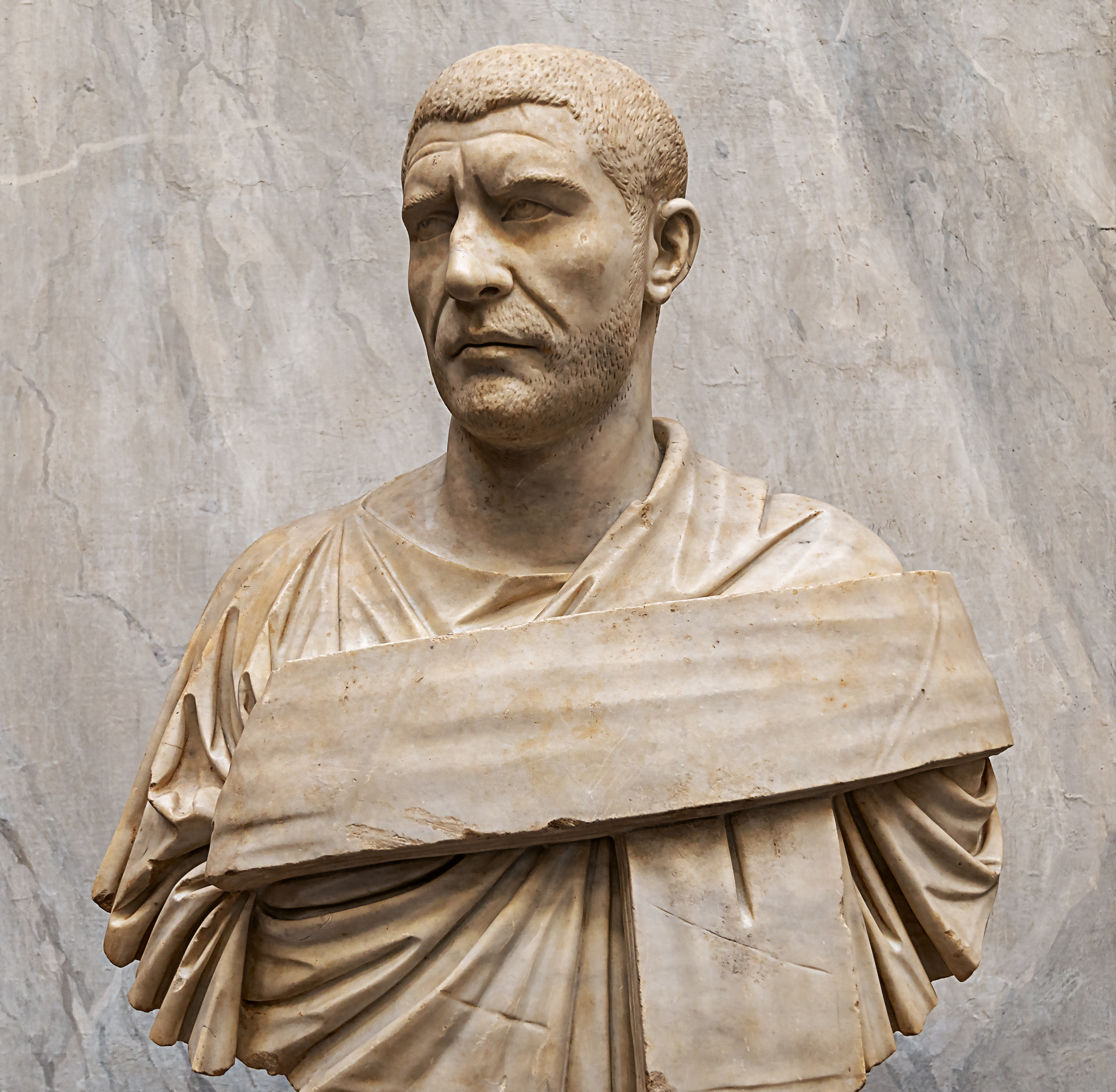 Büste des römischen Kaisers Philippus Arabs (244 - 249). Gefunden 1778 (Castel Porziano) und ausgestellt in den Vatikanischen Museen (INV. 2216)